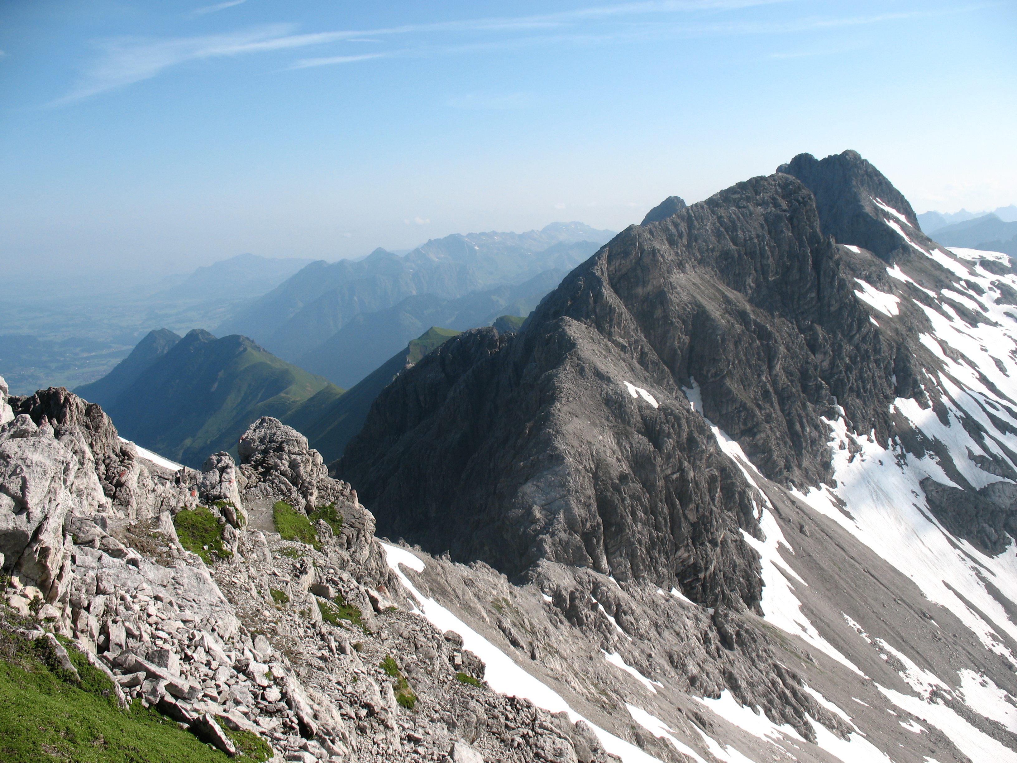 Heilbronner Weg: Bockkarkopf (2609 m) vom Steinschartenkopf über der Bockkarscharte (2504 m). Dahinter rechts die Hochfrottspitze (2649 m). Links hinten das Illertal bei Oberstdorf.